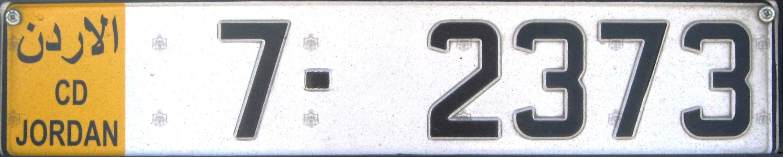 kentekenplaat Jordanië 1